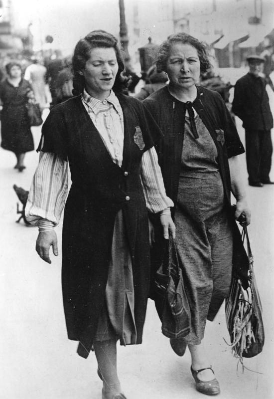 Paris, Französinen mit Judenstern ADN-ZB Frankreich unter faschistischer deutscher Besatzung Ab 1. September 1941 ist in Deutschland die Polizeiverordnung zur Kennzeichnung der jüdischen Bürger mit dem gelben Davidstern in Kraft. Sie ist gültig für Kinder vom 6. Lebensjahr und wird auch auf die jüdischen Bürger der von den Faschisten okupierten Länder übertragen. Mit dem gleichzeitigen Verbot des Verlassens des Wohnortes wird die Deportierung der Juden in die Vernichtungslager der Nazis vorbereitet. Unser Bild zeigt zwei Pariser Bürgerinnen mit dem gelben Davidstern. (Aufnahme 20.6.1942)